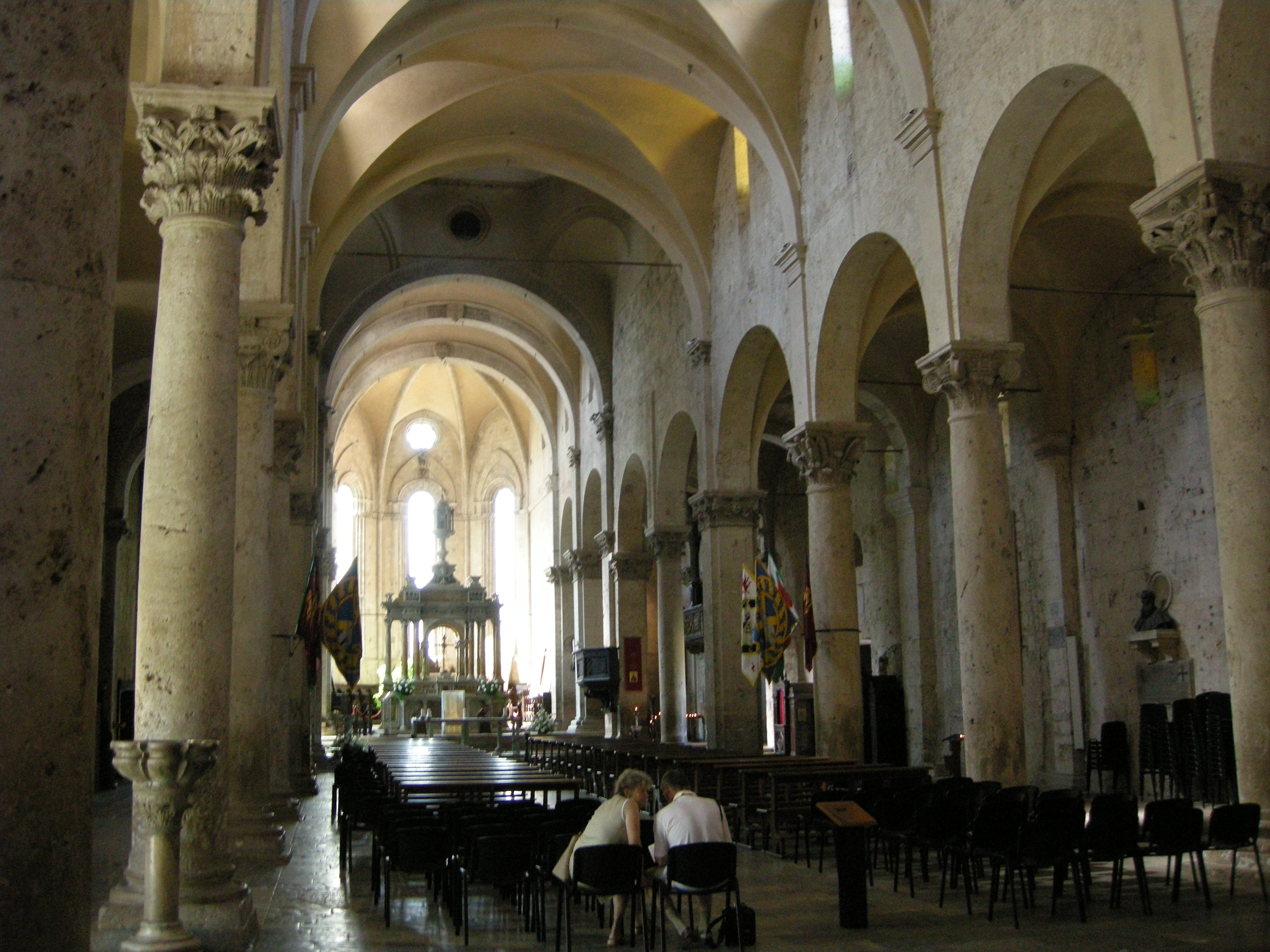 Duomo di massa marittima, interno